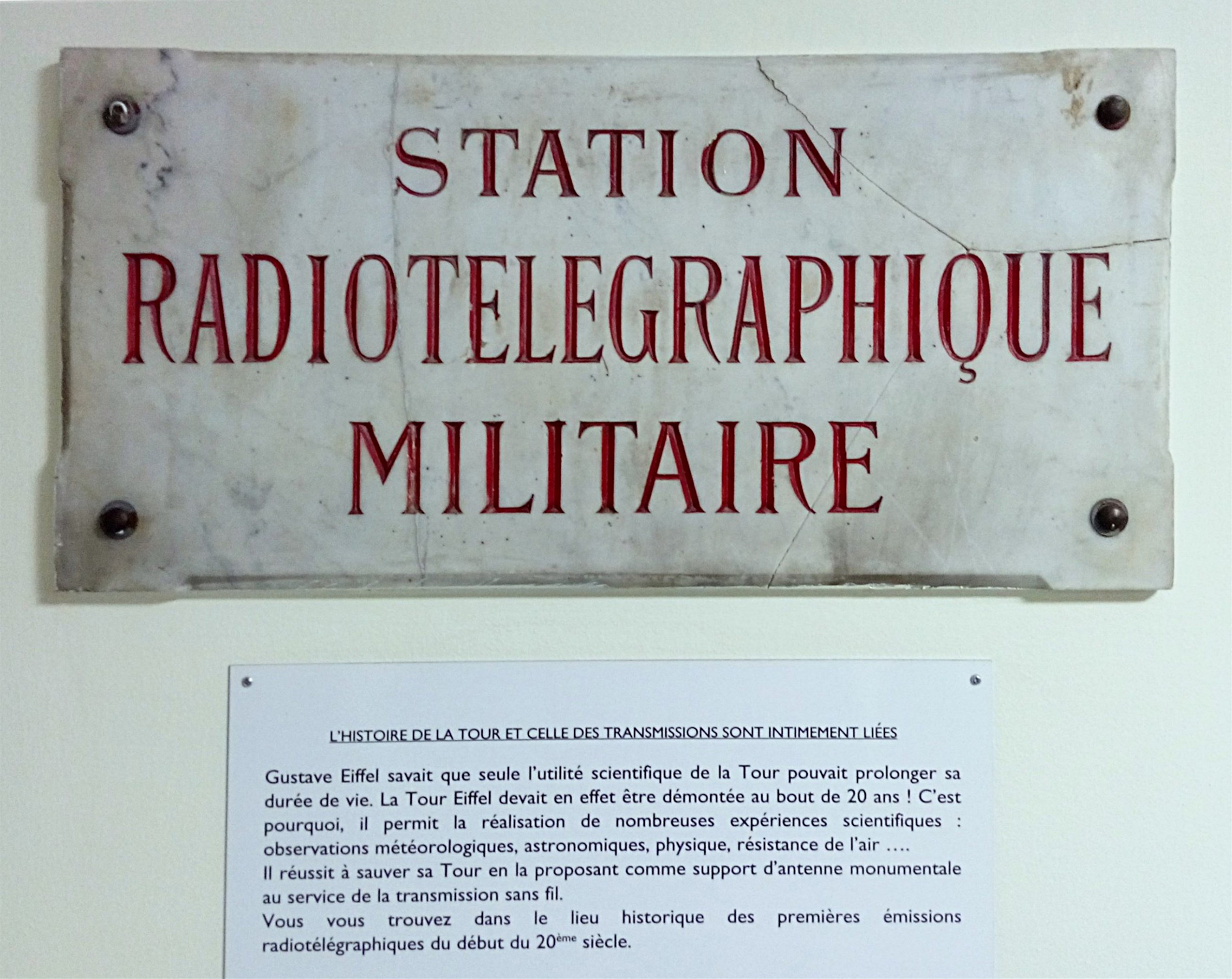 Plaque du bunker du Champs de Mars, anciennement dédié aux communications militaires, Tour Eiffel, 75007 Paris, France.